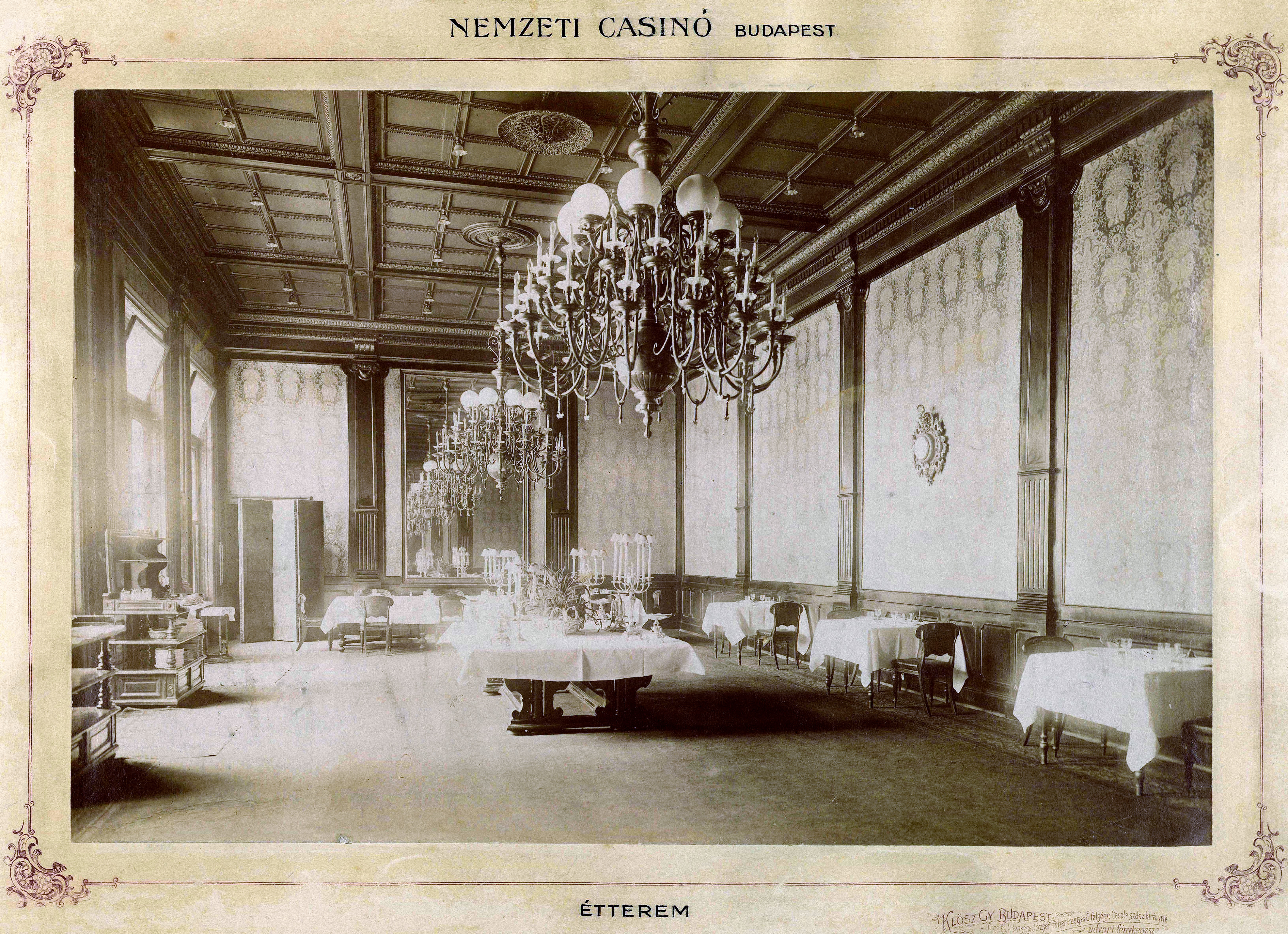 a Kossuth Lajos utca - Szép utca sarkán álló Nemzeti Casino (Cziráky-palota) étterme. A felvétel 1895-1899 között készült. A kép forrását kérjük így adja meg: Fortepan / Budapest Főváros Levéltára. Levéltári jelzet: HU.BFL.XV.19.d.1.11.001 Location: Hungary, Budapest V. Tags: Budapest